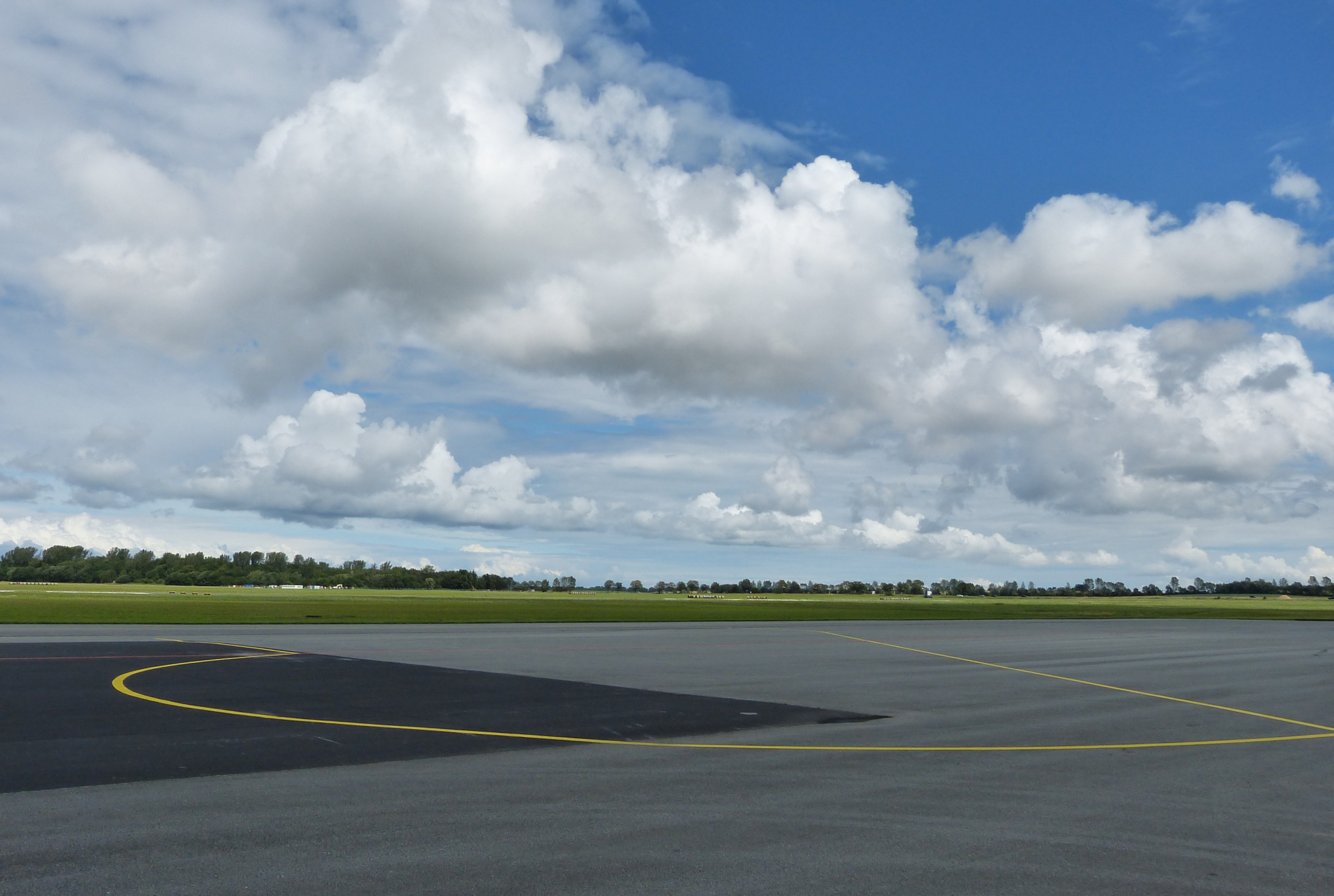 Landebahn Rollfeld Flughafen Stralsund Barth